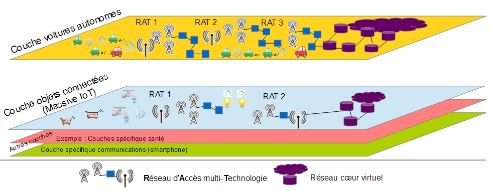 schéma décrivant le networck slicing 5G ioT. Fait par Christian FOURNEL avec Open office et paint